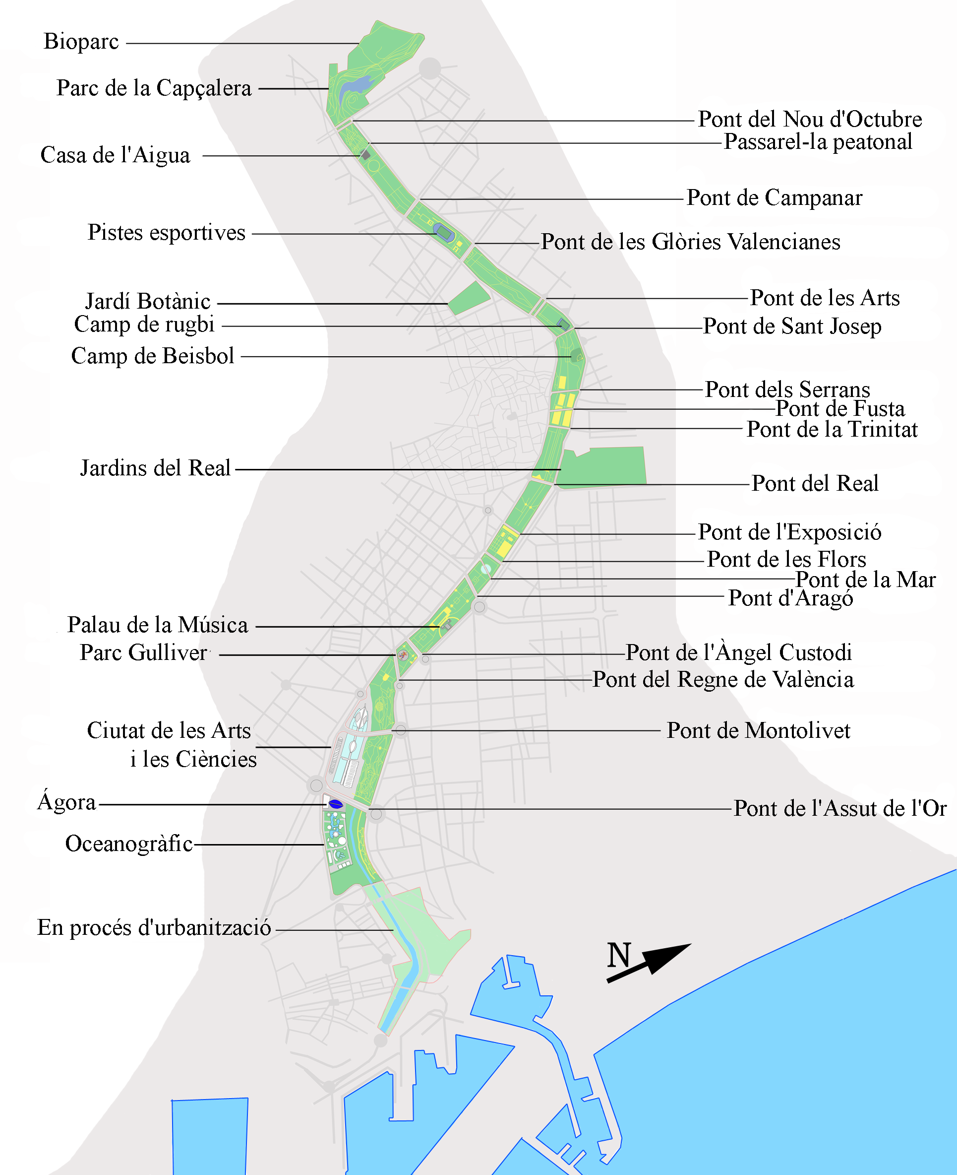 Plànol del Jardí del Túria. València, Comunitat Valenciana, Espanya.